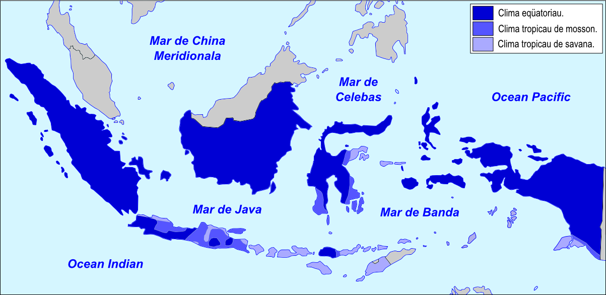 Esquèma generau dau clima d'Indonesia.